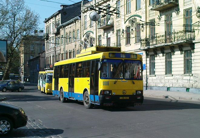 оновлений ЛАЗ 52522 (008) у місті Львів на 5-му маршруті